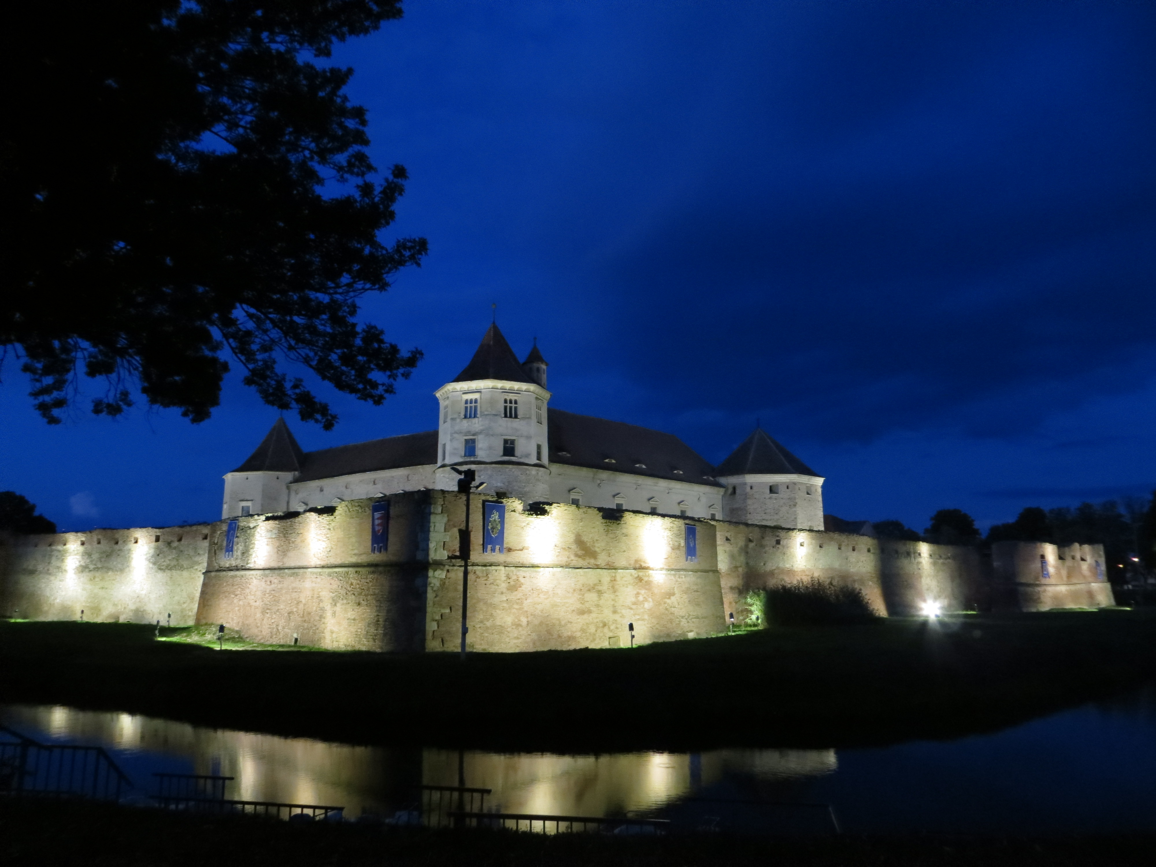 Cetatea Făgăraș